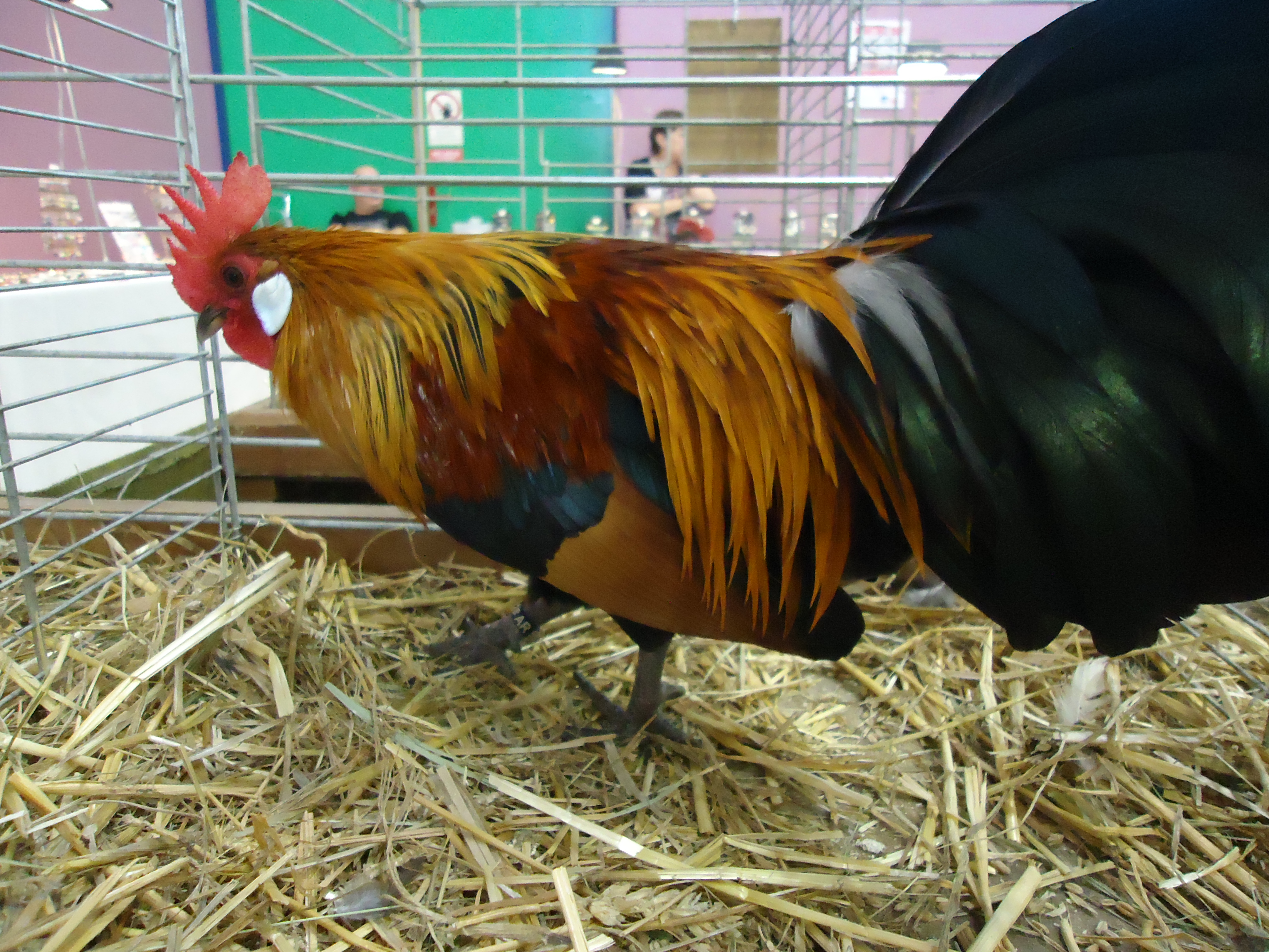 Coq nain